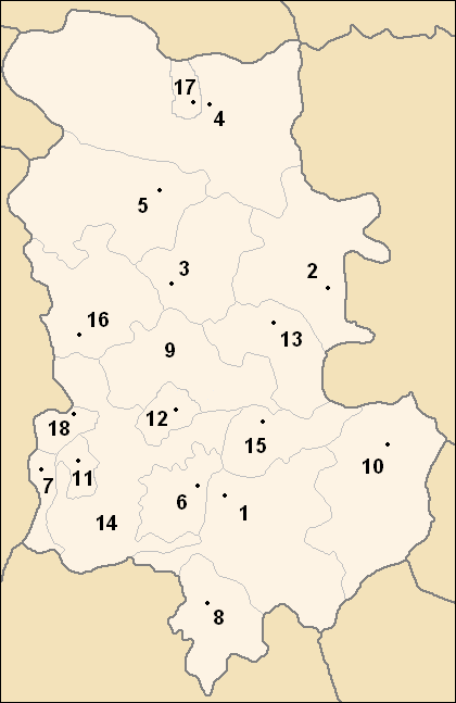 Sujet : carte des obchtini (municipalités) de l'oblast de Plovdiv, en Bulgarie Auteurs : Потребител:Ljubo (Любомир Таушанов = Lyoubomir Taouchanov), pour la version originale en bulgare, Utilisateur:Hégésippe Cormier, pour la translittération française Source : Картинка:Plovdiv Oblast map.PNG (22 mai 2005) Licence